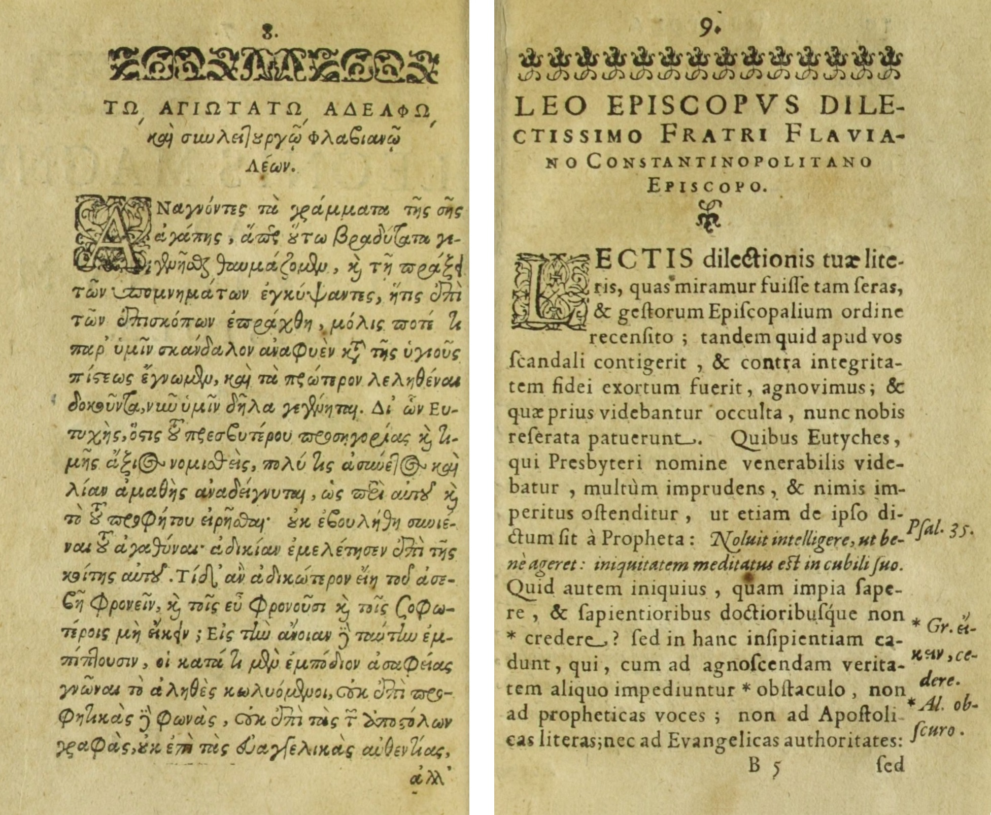 Anfang des Lehrschreibens Papst Leos I. an Erzbischof Flavian von Konstantinopel aus dem Jahr 449, verlesen auf dem Konzil von Chalcedon 551, Ausgabe Hamburg (Nicolaus Glaser) 1614, griechisch und lateinisch